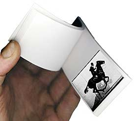 Animasyon yapmak için basit bir yöntem: çevirmeli defter (İngilizce flipbook).